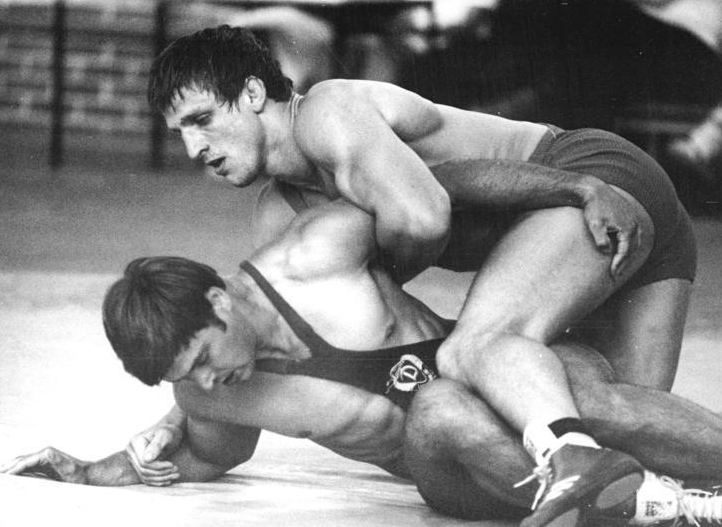 Uwe Neupert ADN-ZB 15.8.82-kn Edmonton: Gold für Uwe Neupert Durch ausgezeichnetes technisch-taktisches Können und großartigen Kampfgeist wurde zum Abschluß der 21. Ringer-Weltmeisterschaften im Freien Stil in Edmonton der Jenauer Uwe Neupert (Halbschwergewicht) neuer Titelträger. Foto vom Training vor der Weltmeisterschaft.